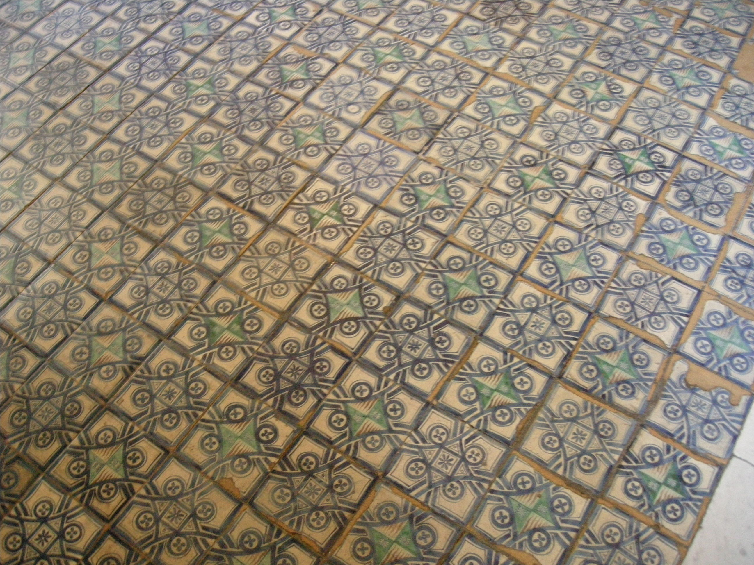 Appartamento borgia